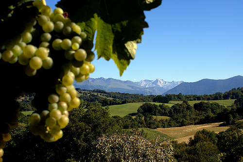 Manseng Vignoble du jurançon (Lasseubetat, Pyrénées-Atlantiques) Aquitaine France